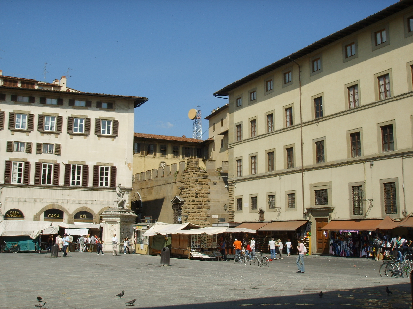 Piazza San Lorenzo (Florence).